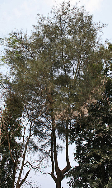 Casuarina equisetifolia Whistling Pine in Kolkata, West Bengal, India.